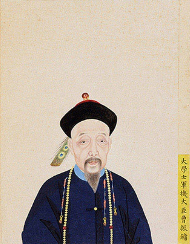 中文（台灣）: 曹振鏞（1755年－1835年），字儷笙，又字懌嘉，安徽歙縣人，清朝嘉慶、道光年間重臣。